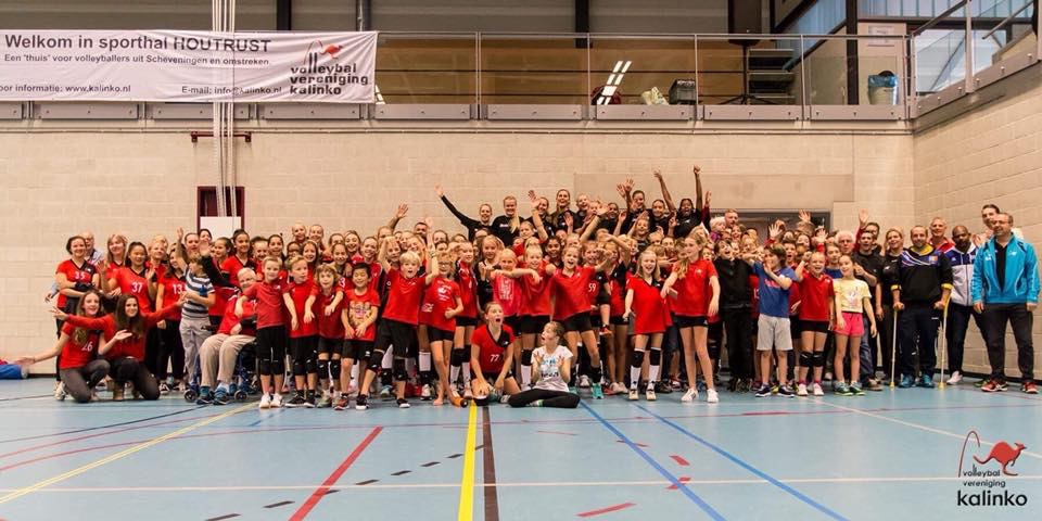 Leden van Kalinko van alle leeftijden.